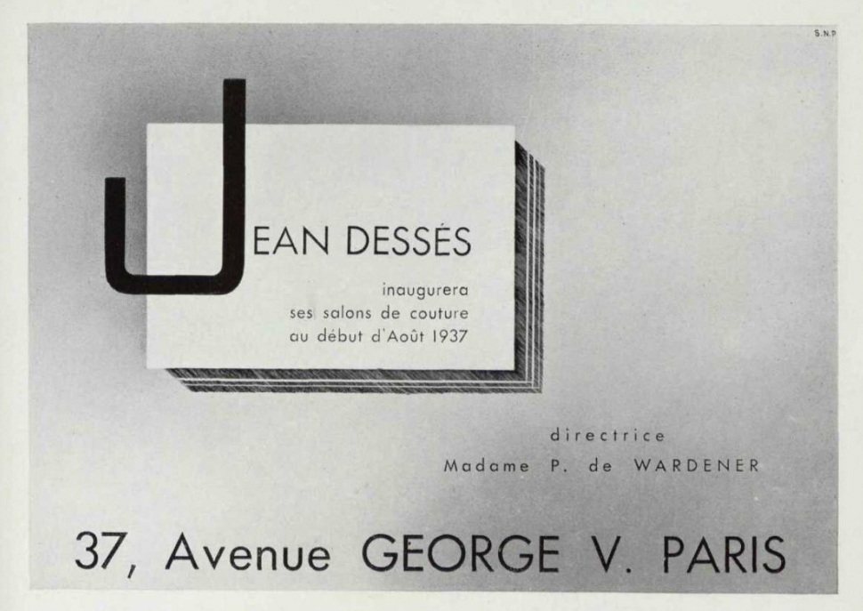 Invitation Inauguration boutique